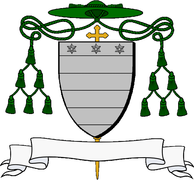 Treustellet a c'hwec'h pezh, karget ouzh kab gant teir rodig-kentr